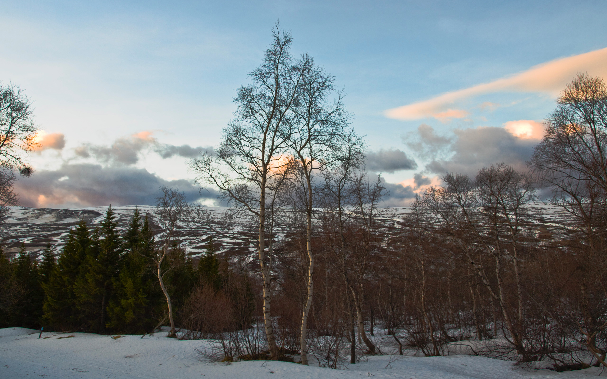 PC272444